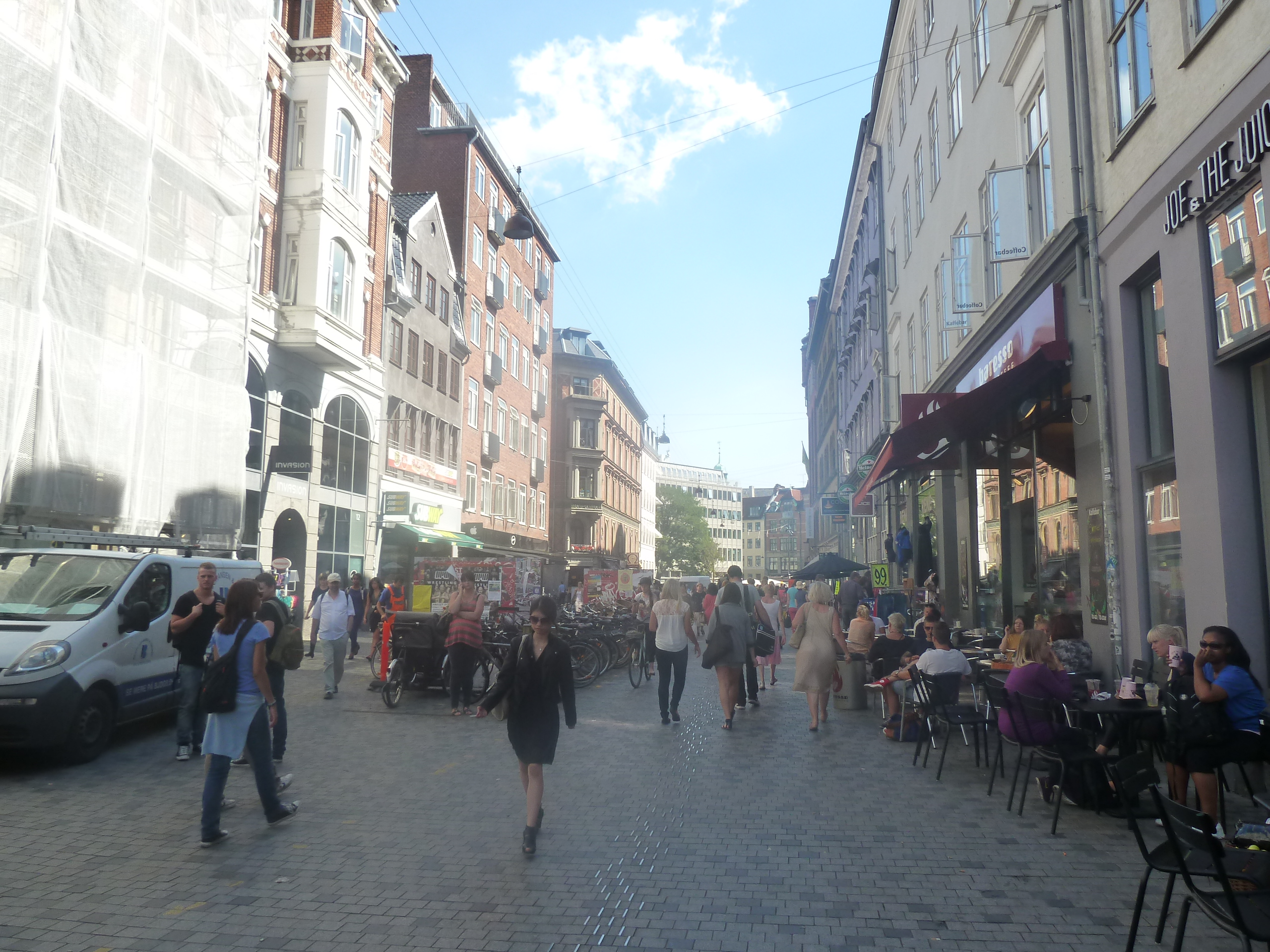 The street Frederiksborggade in Indre By in Copenhagen.